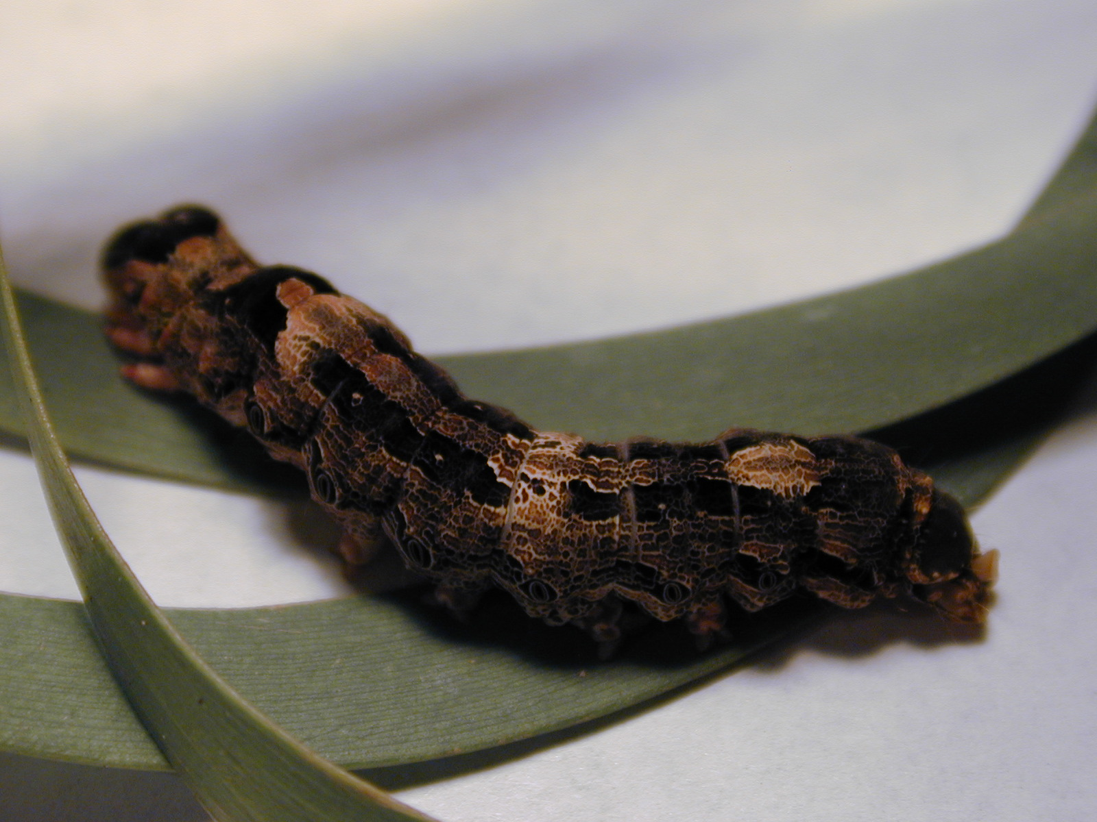 Ascalapha odorata, larva, on Acacia koaia. Location: Maui, Puu o Kali